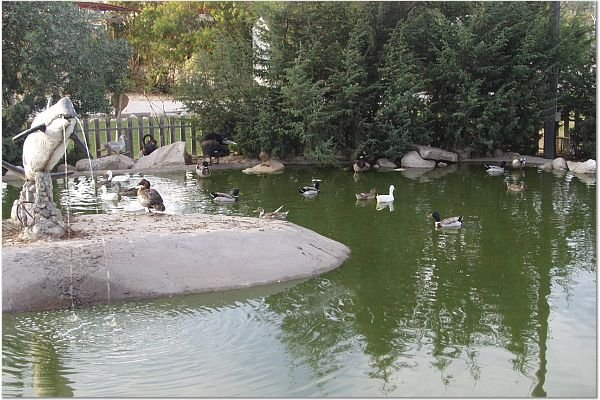 נוה דקלים התמונות באדיבות קטיף.נט (קישור) אתר האינטרנט של גוש קטיף. צילם: מוטי סנדר.